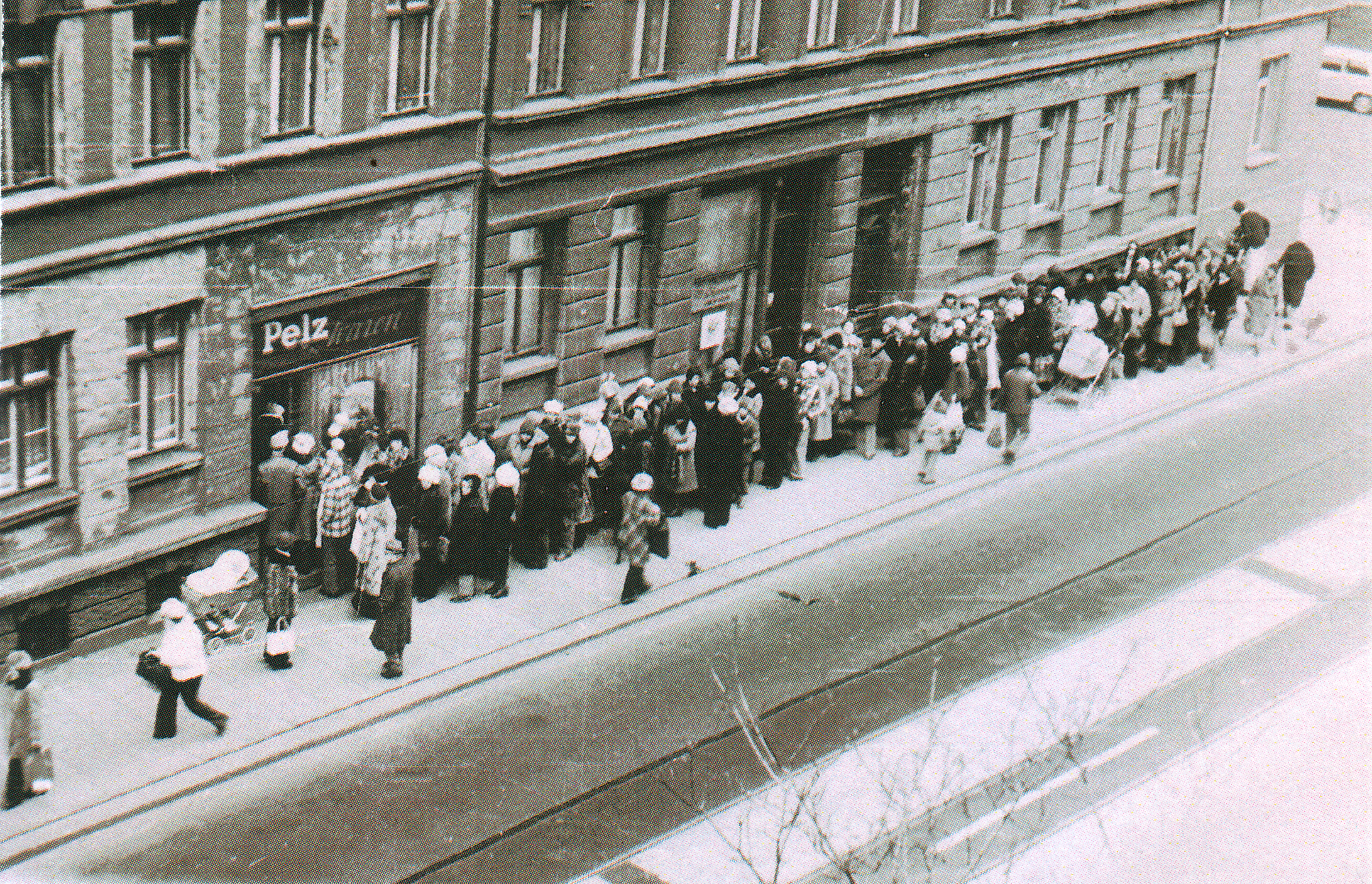 Anstehen der Kunden nach Kanin-Tschapkas. Klaus Rüdiger, Kürschnermeister, Leipzig, Riebeckstraße 28. Wie die allermeisten Waren waren auch Kaninfelle in der DDR Mangelware, obwohl zu der Zeit noch sehr viele Kaninchen privat für den Sonntags- oder Fest-Karnickelbraten gehalten wurden. Die Kürschner bekamen die Felle nach Zuteilung. Kürschnermeister Rüdinger arbeitete daraus die beliebten, sogenannten „Tschapkas“ (russisch: Mützen, eigentlich Uschanka, russisch: Ohrenklappenmütze) aus Kaninchenfellen. Er kündigte den Verkauf vorher an, und es bildeten sich zu dem Termin, wie auf dem Bild zu sehen, lange Schlangen. Am Laden wurde fortlaufend aktualisiert angezeigt „noch 20 Stück“, damit sich niemand unnötig anstellte. Es soll ein Foto aus dem gegenüberliegendem Haus gegeben haben, auf dem die Warteschlange so lang war, dass das Ende nicht mehr auf das Bild passte. Die Felle kamen in der Regel von seinem Vater, der trotz der allgemeinen Staatswirtschaft einen prvivaten Fellhandel betrieb, für den er in der DDR herumreiste um die Felle einzukaufen.